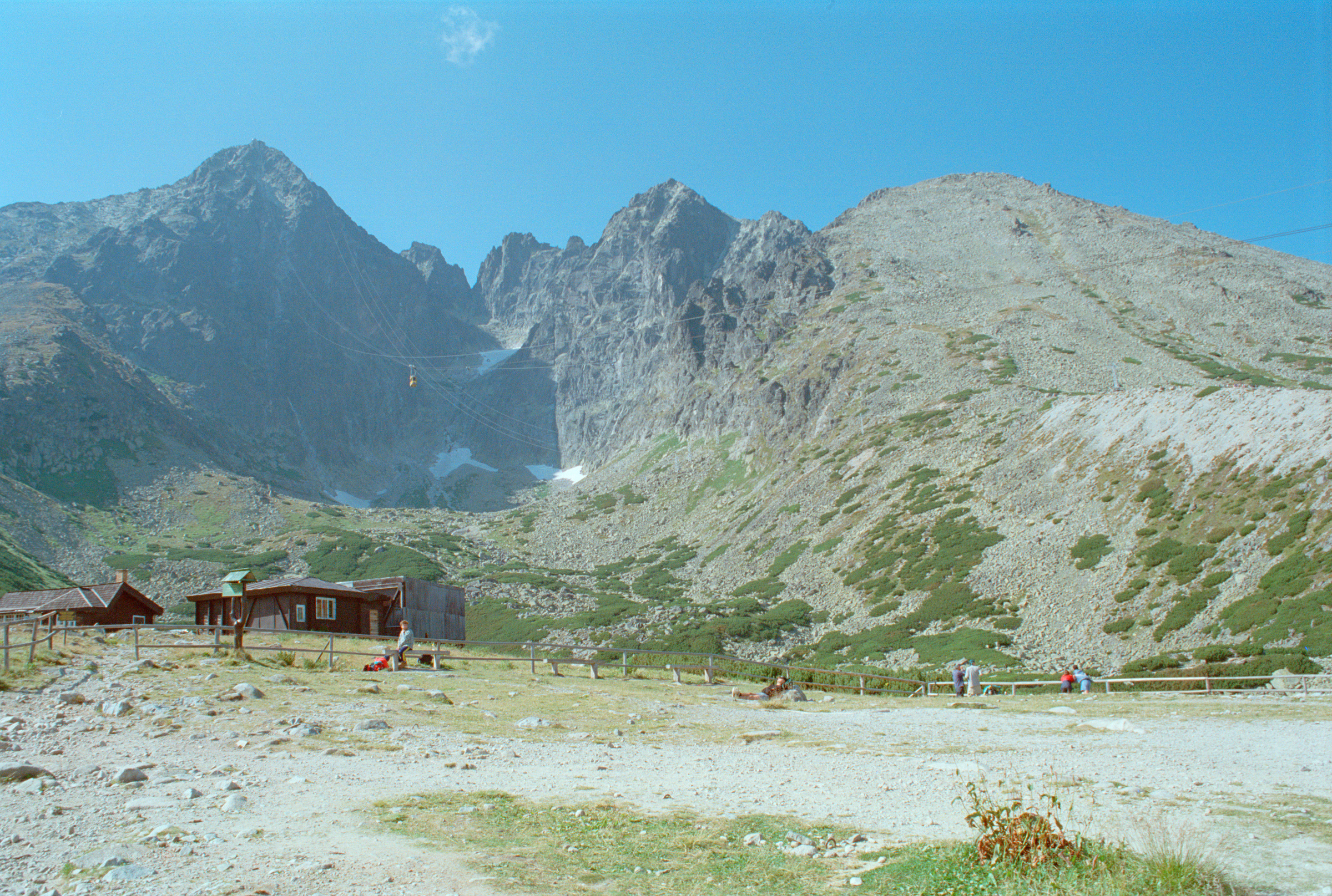 Lomnický štít from Skalnaté Pleso own picture, taken in summer 2000